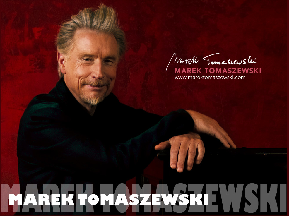 Pianista Marek Tomaszewski.